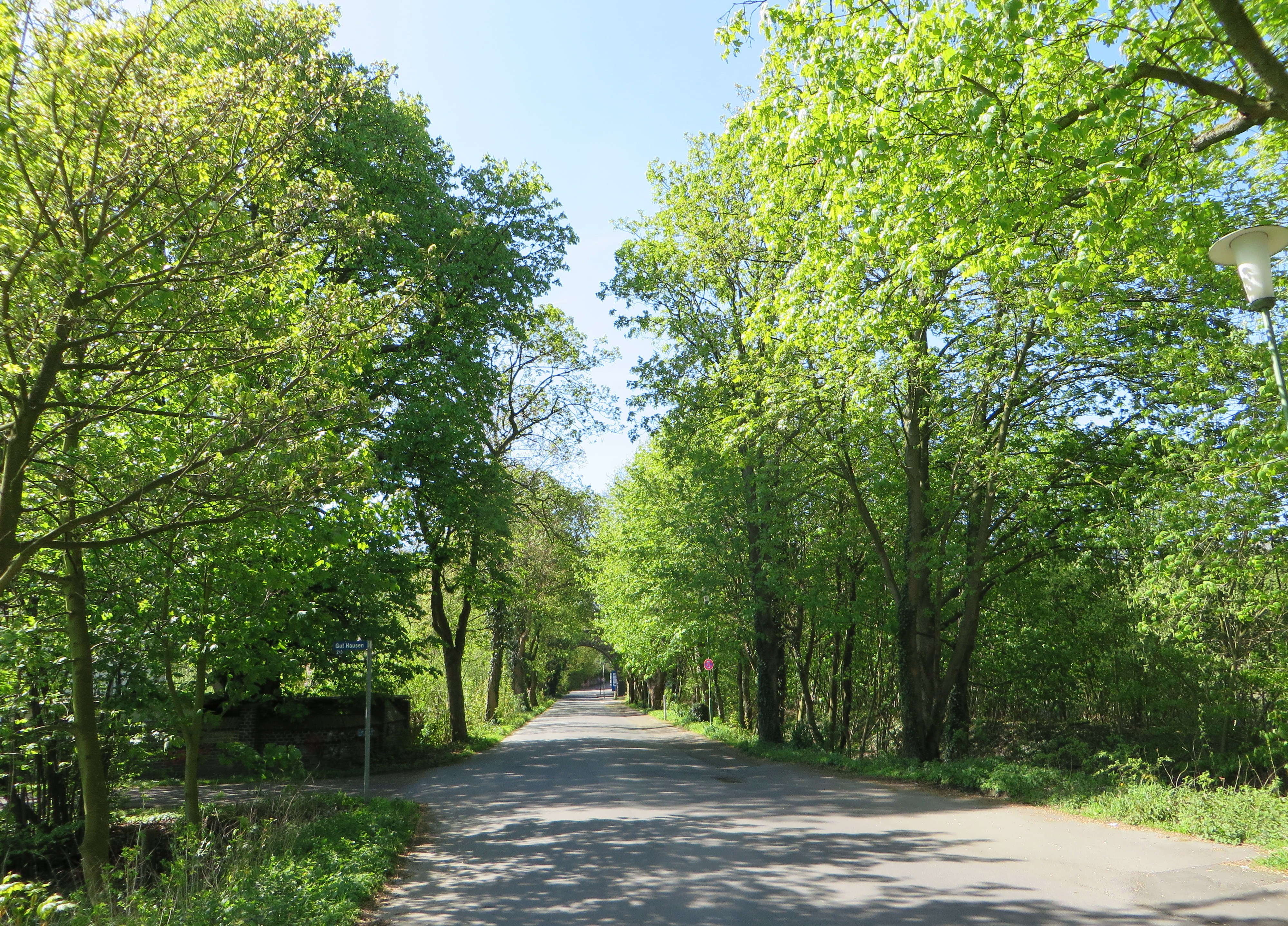 Landschaftsschutzgebiet „Gut Hausen“ in Hagen-Vorhalle. Blick auf die Brüninghausstraße, die das Schutzgebiet durchquert. Es liegt zwischen Herdecker Straße, A 1 und der Bahnstrecke Hagen–Herdecke. Es handelt sich teilweise um landwirtschaftlich genutzte Flächen im Auenbereich von Ruhr und Volme und um den Mündungsbereich der Volme in die Ruhr.